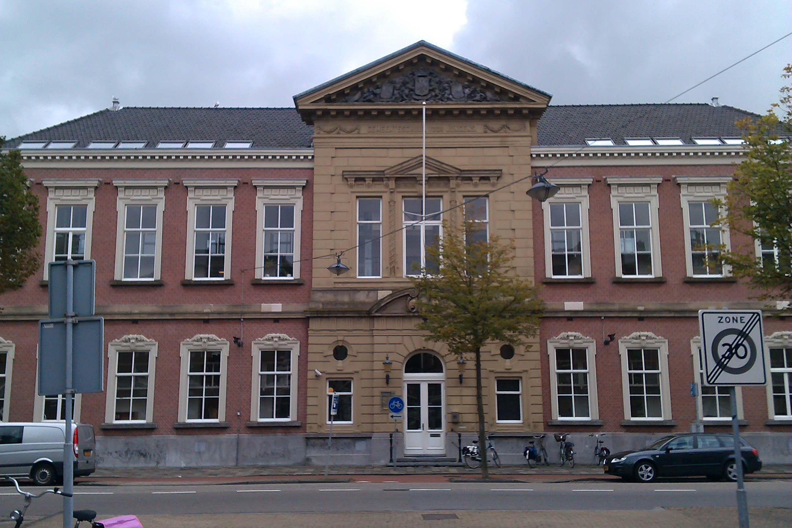 Gemeentelijke school voor jongens, neoclassicistisch